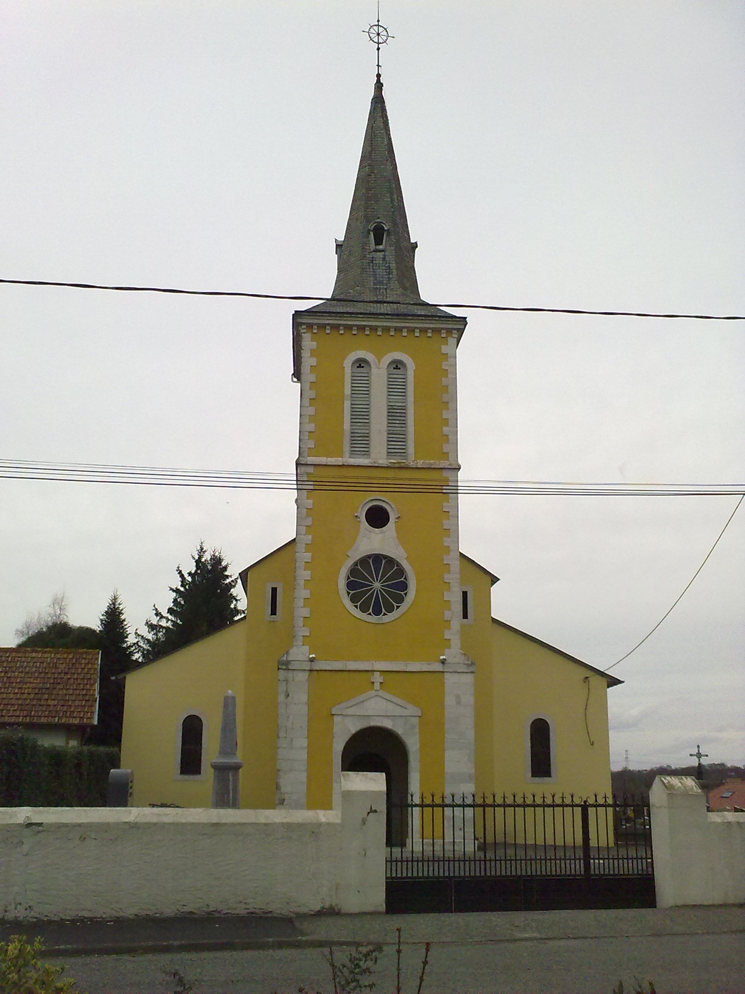 Eglise de Gabaston